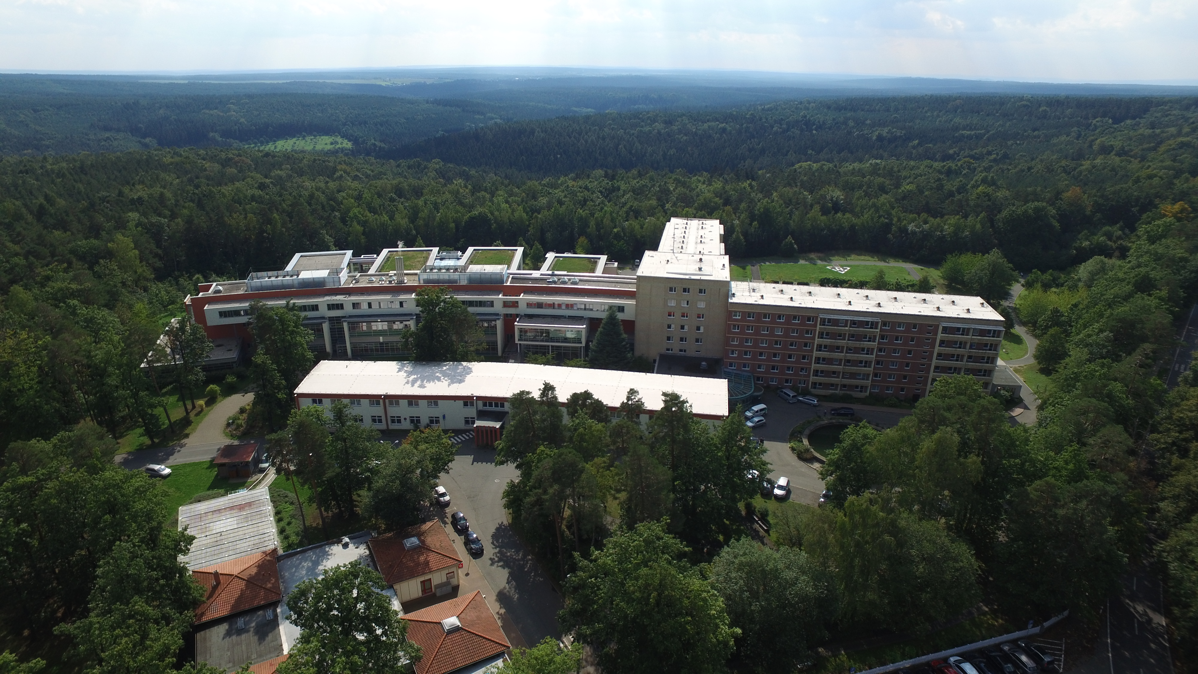 Blick auf die Klinik